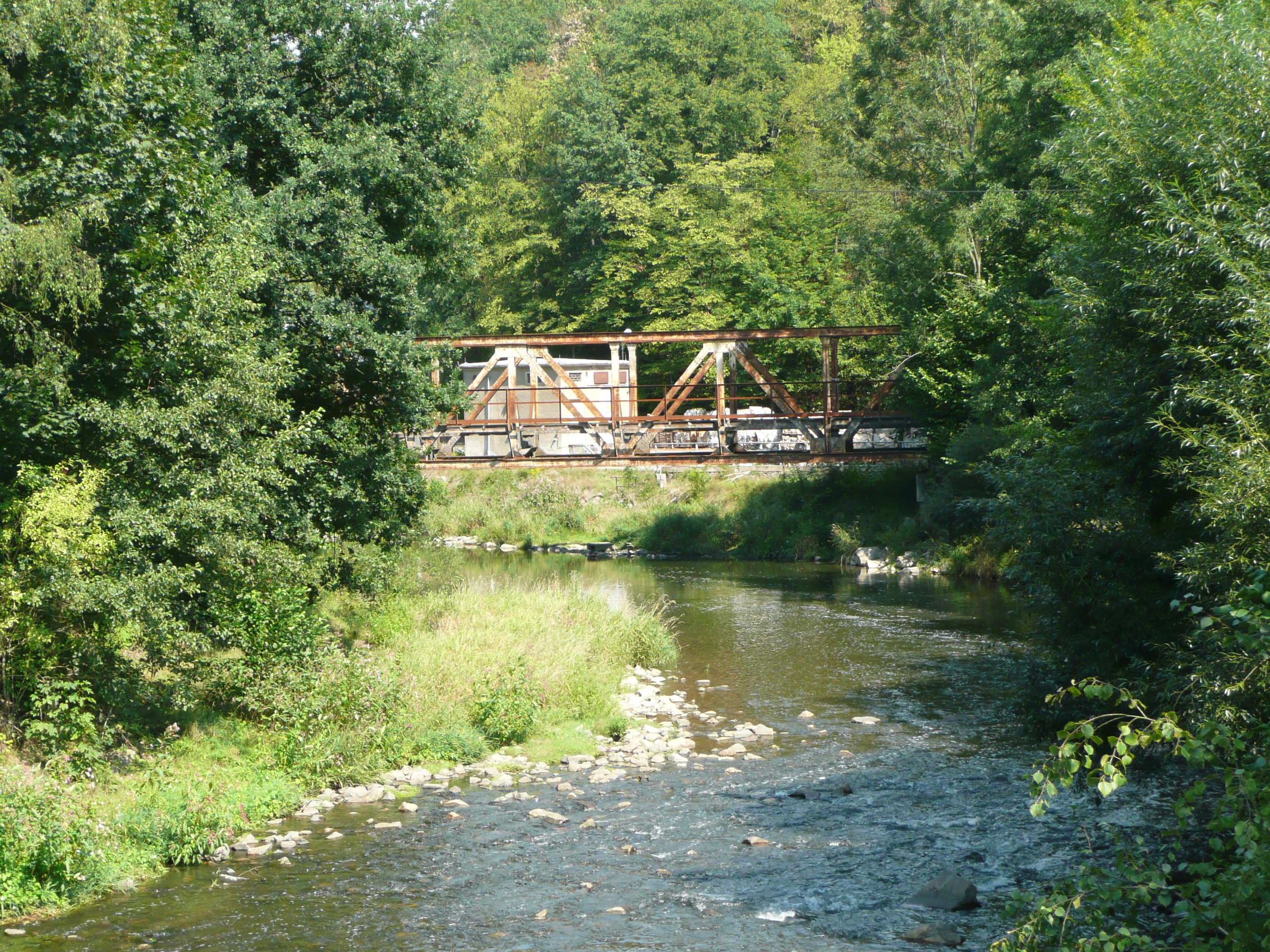 Brücke der Schmalspurbahn Willsdruff-Nossen an dem ehemaligen Bahnhof Obergruna-Bieberstein